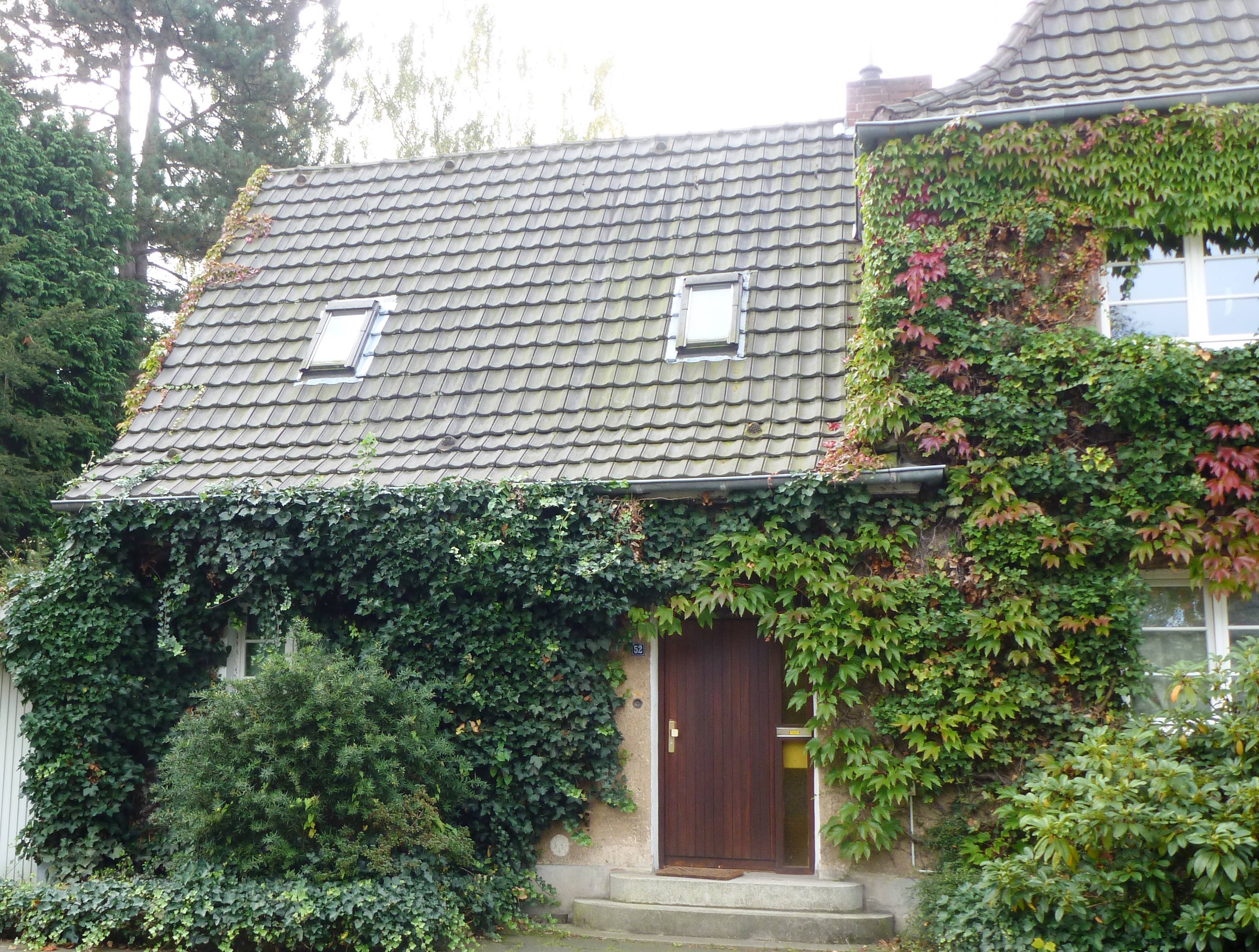 Haus Andersenstr. 52 in Köln-HolweideThis is a photograph of an architectural monument.